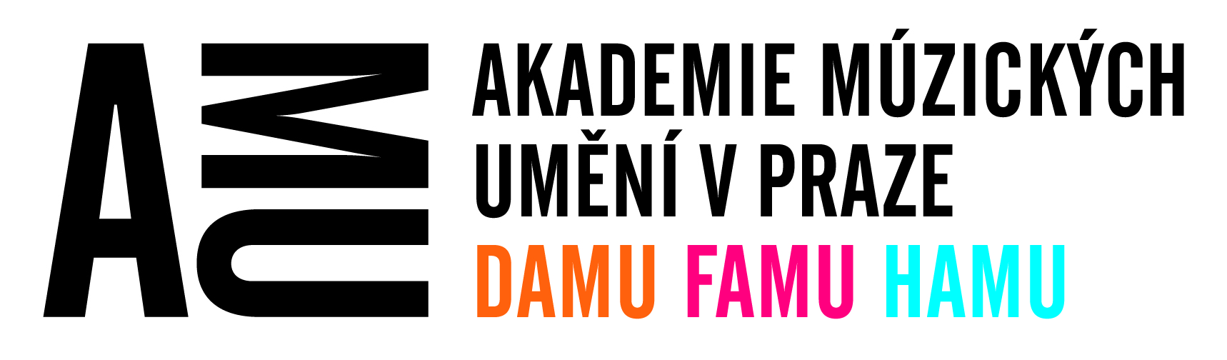 Nové logo AMU s fakultami v českém jazyce.